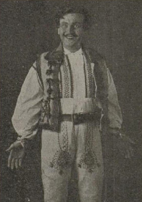 Vladimír Řepa, český herec